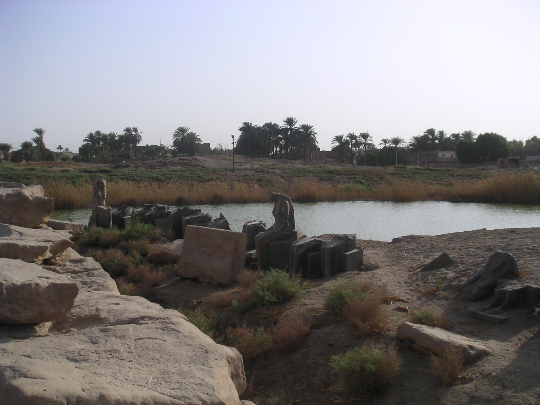 Statues de Sekhmet bordant le lac sacré Isherou du temple de Mout à Karnak - Louxor - août 2005